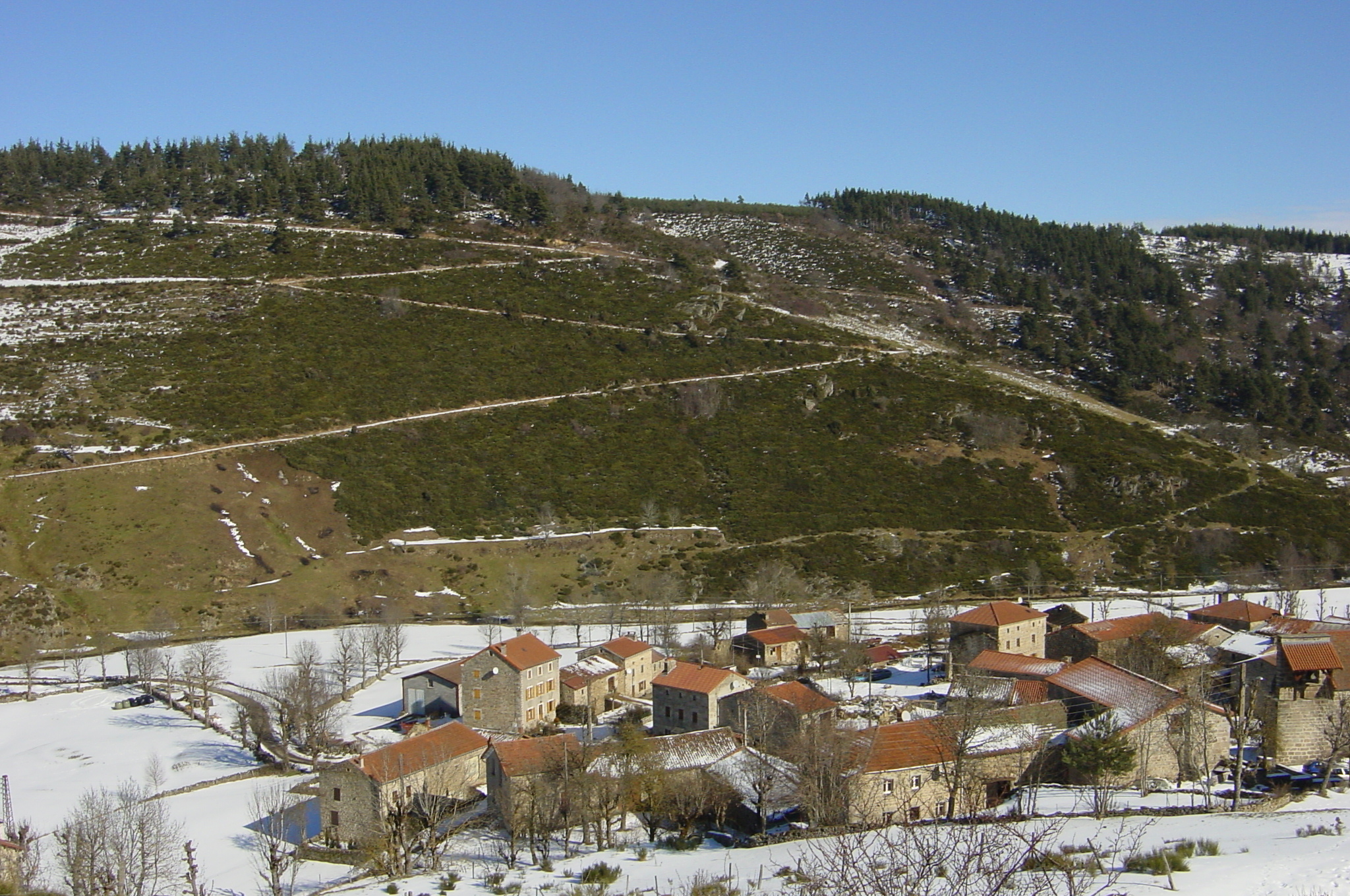 maison sous la neige